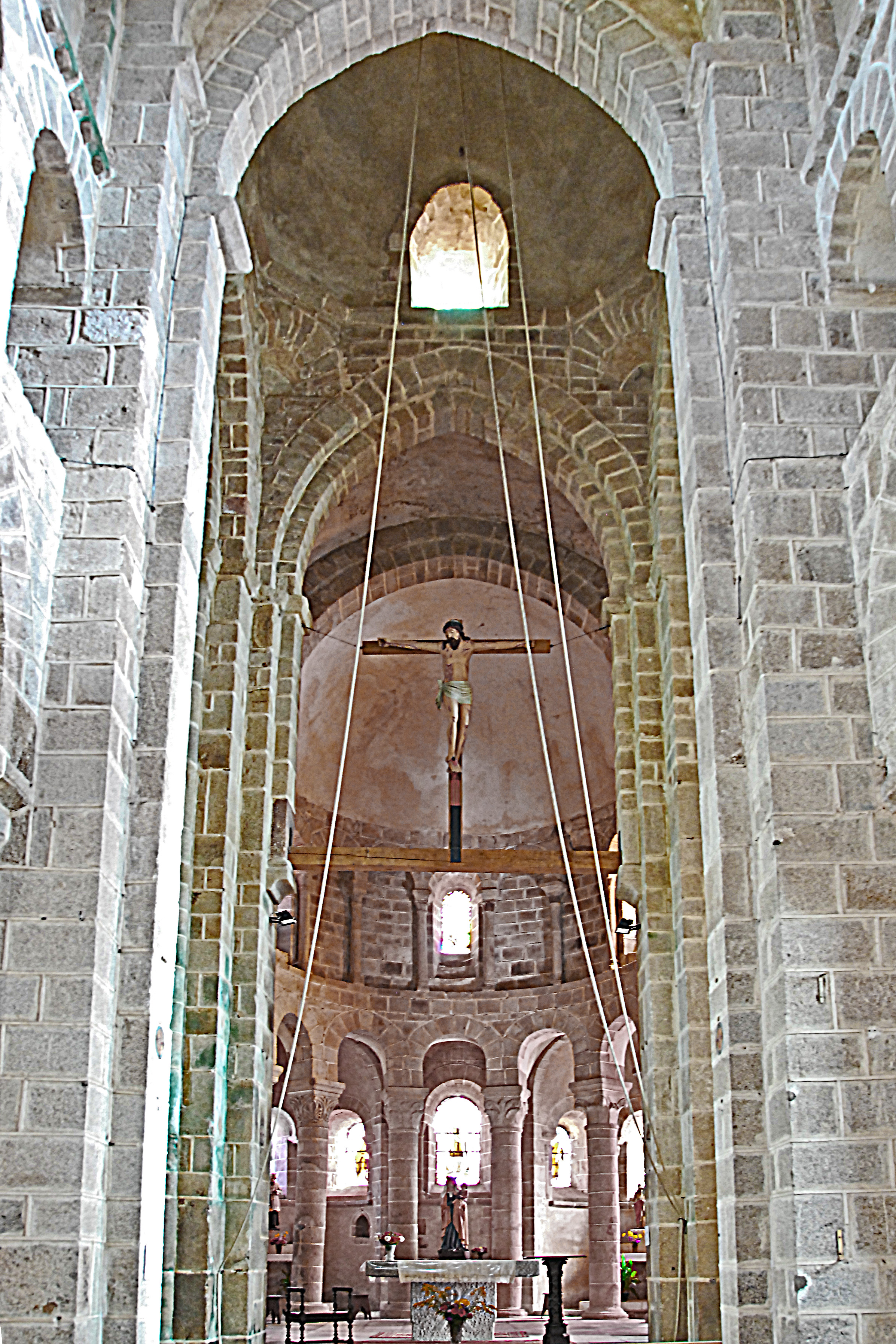 N.-D. de Châtel-Montagne, Vierung aus Mittelschiff